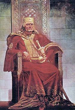 Romantični prikaz iz sredine 19. stoljeća, ulje na platnu.